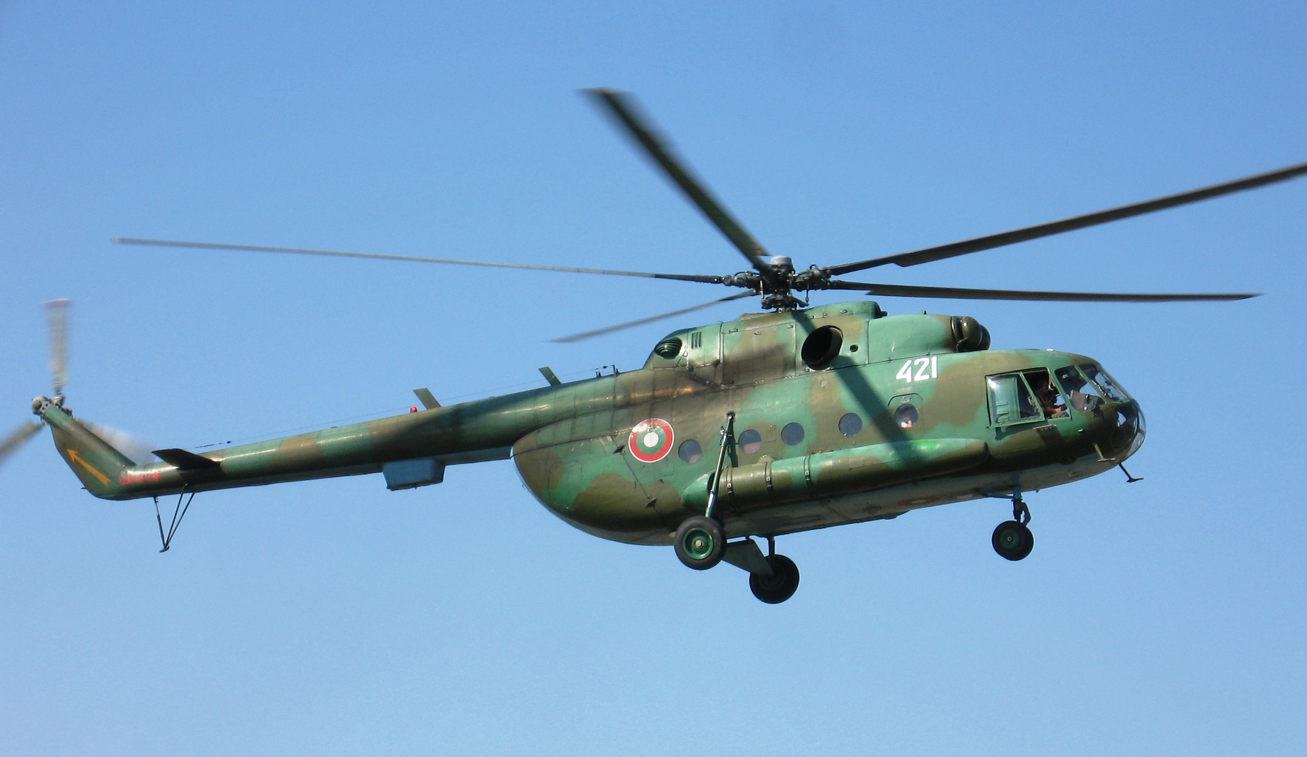 Хеликоптер Ми-17 от състава на ВВС на Р България. Август 2007 г.